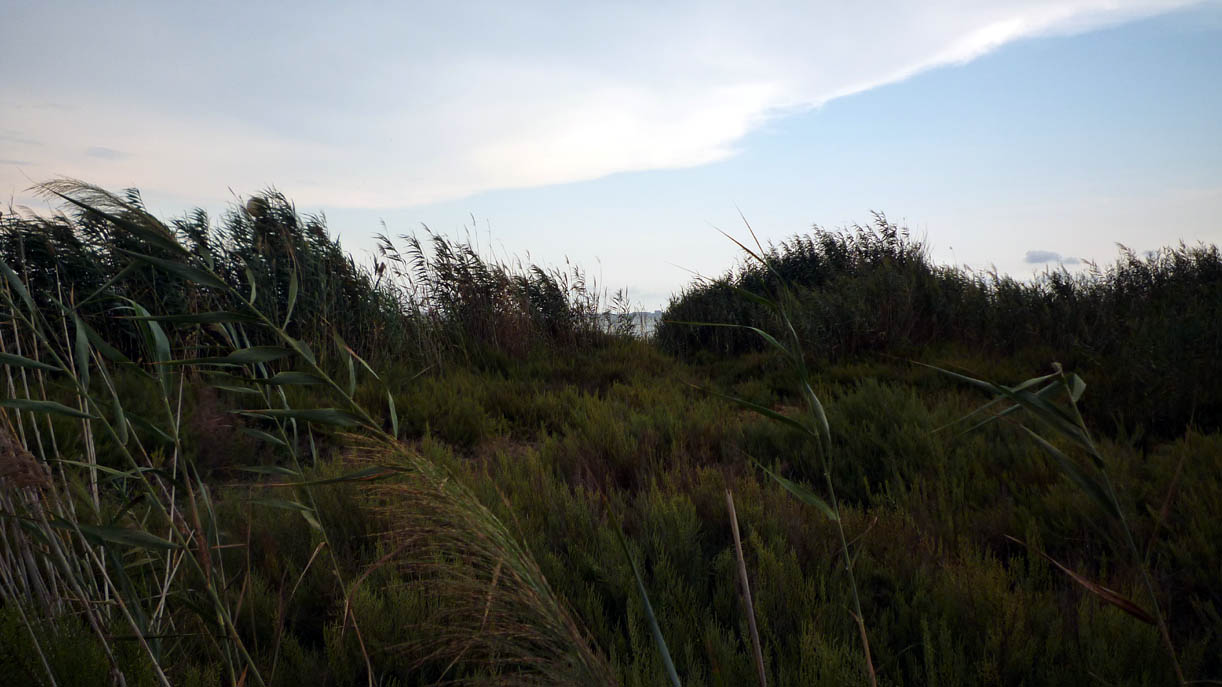 Playa de La Hita en Los Alcázares (Región de Murcia). Espacio protegido dentro del parque natural de "Islas y espacios abiertos del Mar Menor".